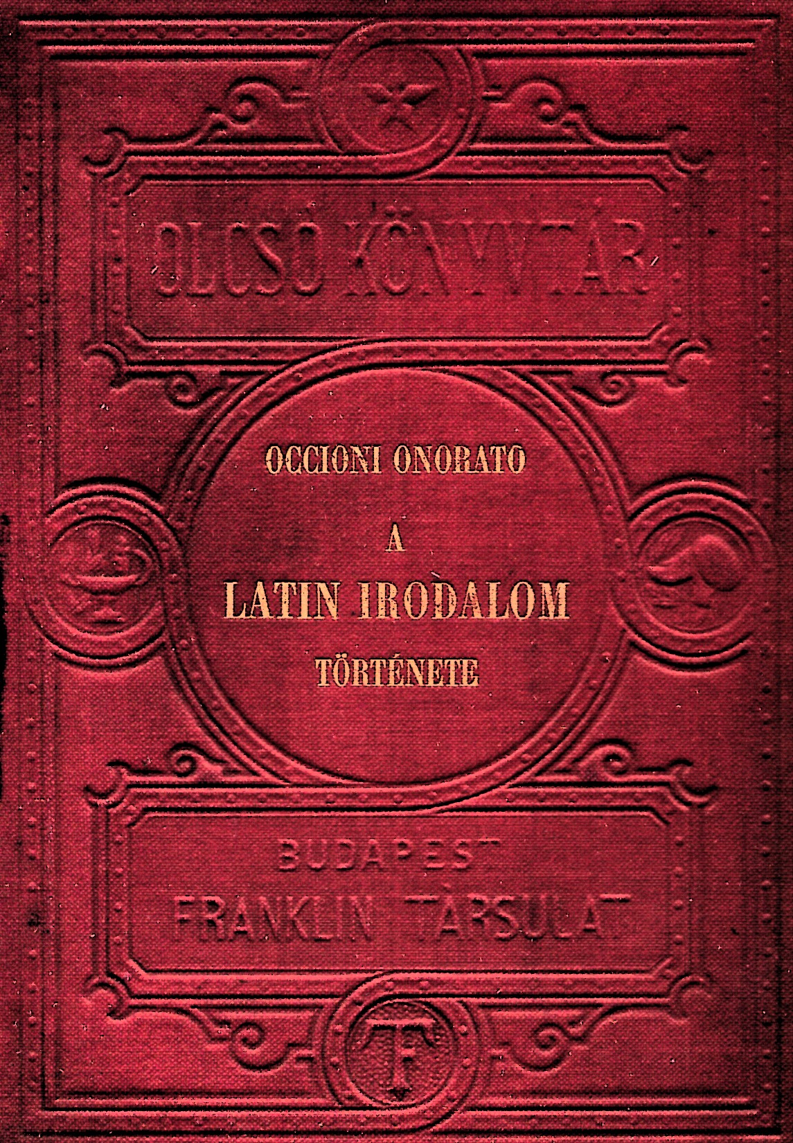 Occioni Onorato (1830-1895): A latin irodalom története (1899)